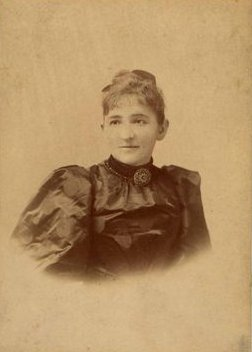 Rákosi Szidi (1852-1935) kb. 36 éves korában.